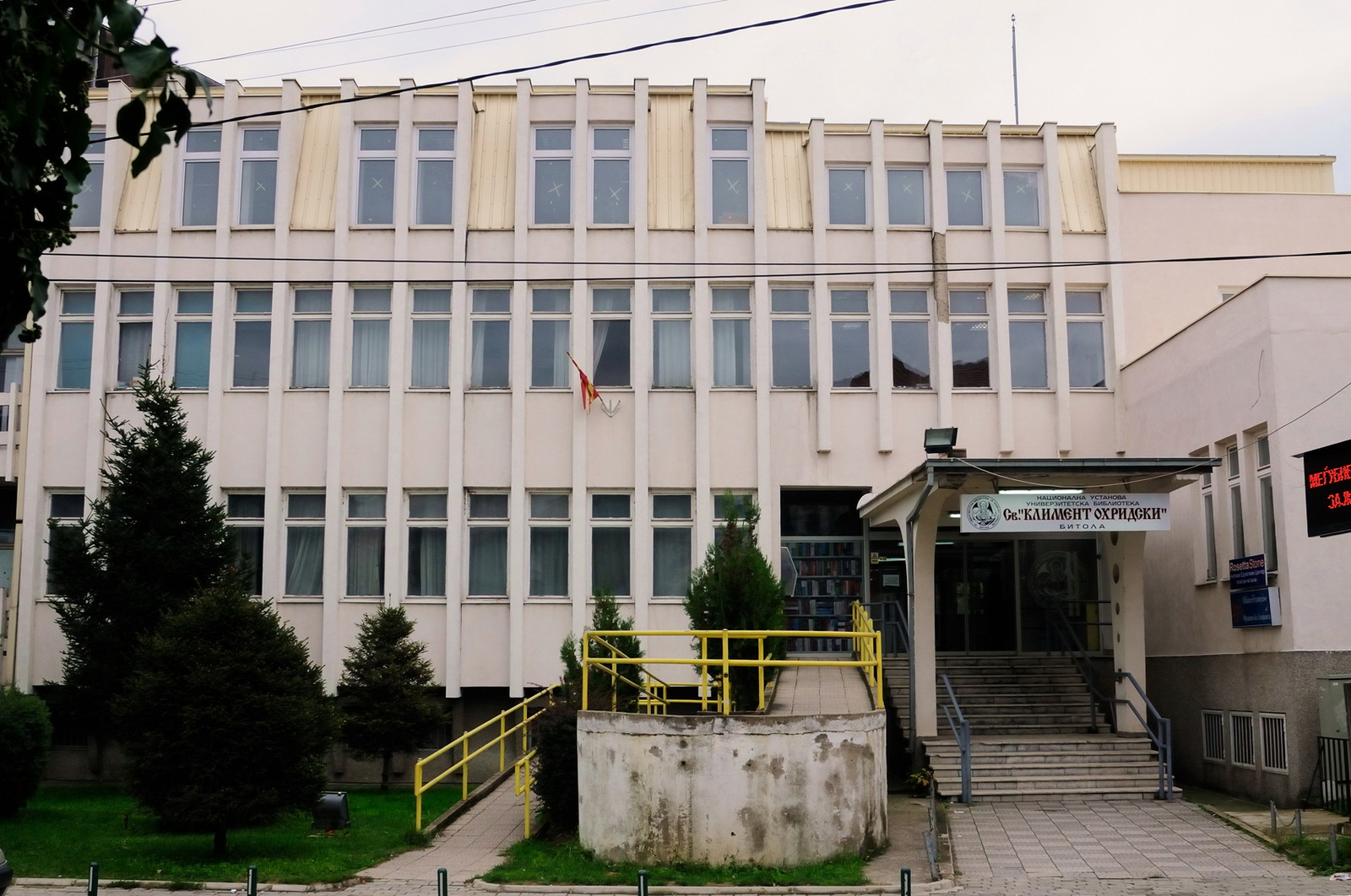 Maticna biblioteka Kliment Ohridski Bitola